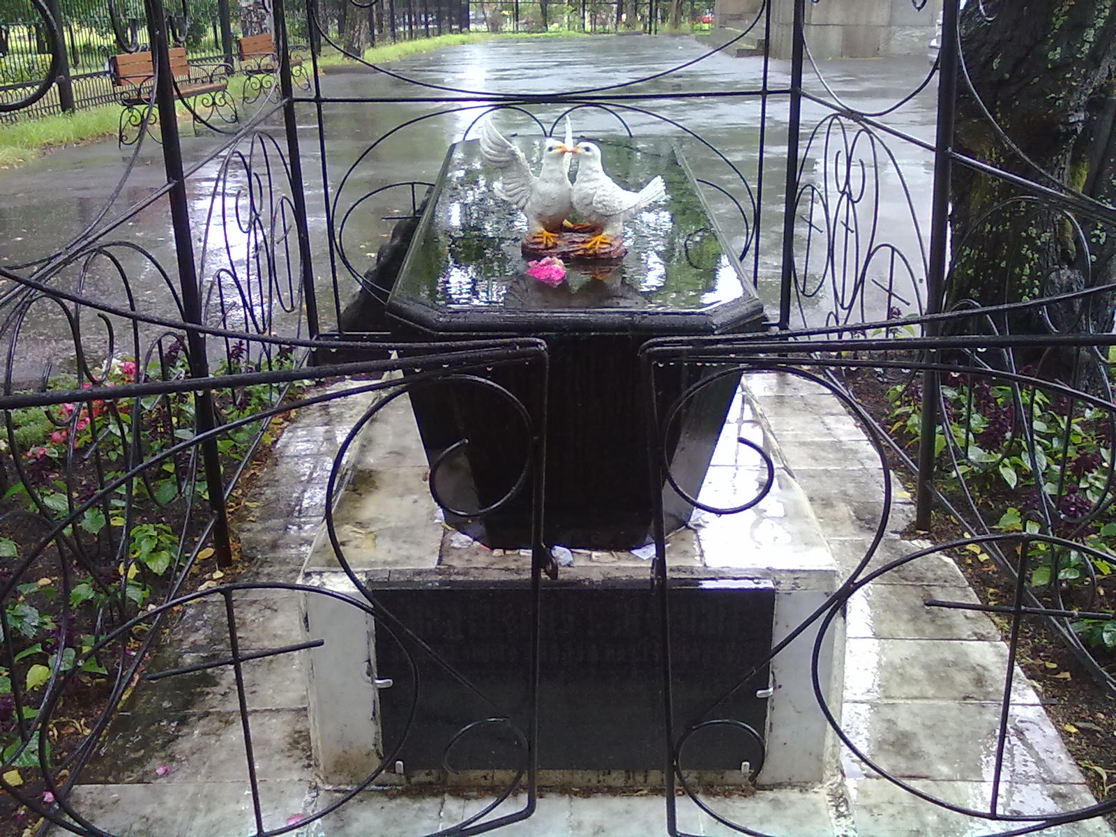 Мемориальная плита, находящаяся на территории Александро-Невского кафедрального собора Петрозаводска.